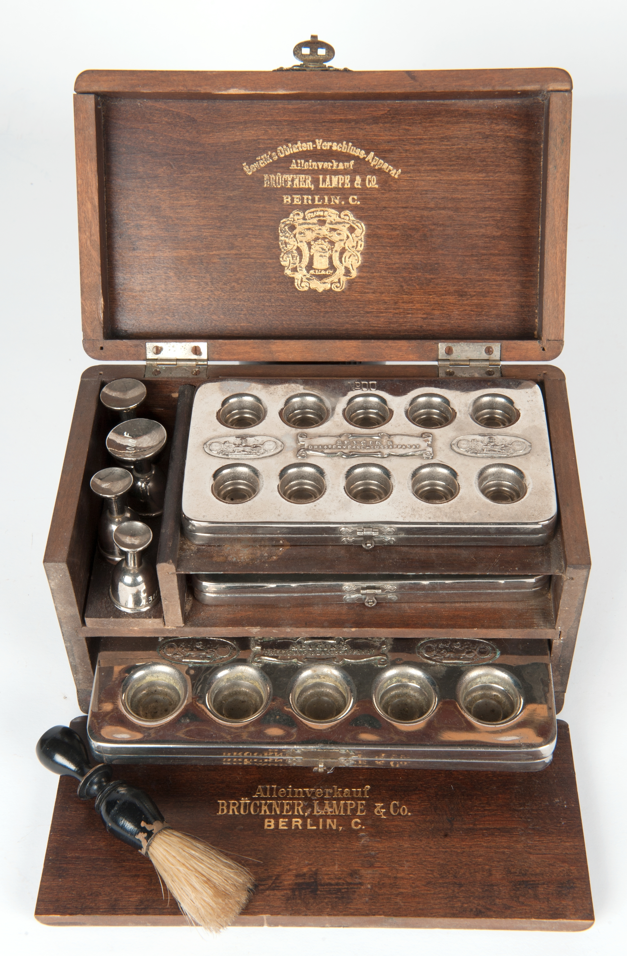 Treskrin med Sevics kapselapparat. "Sevciks Oblaten-Verschluss-Apparat Alleinverkauf Brückner, Lampe & Co. Berlin. C."